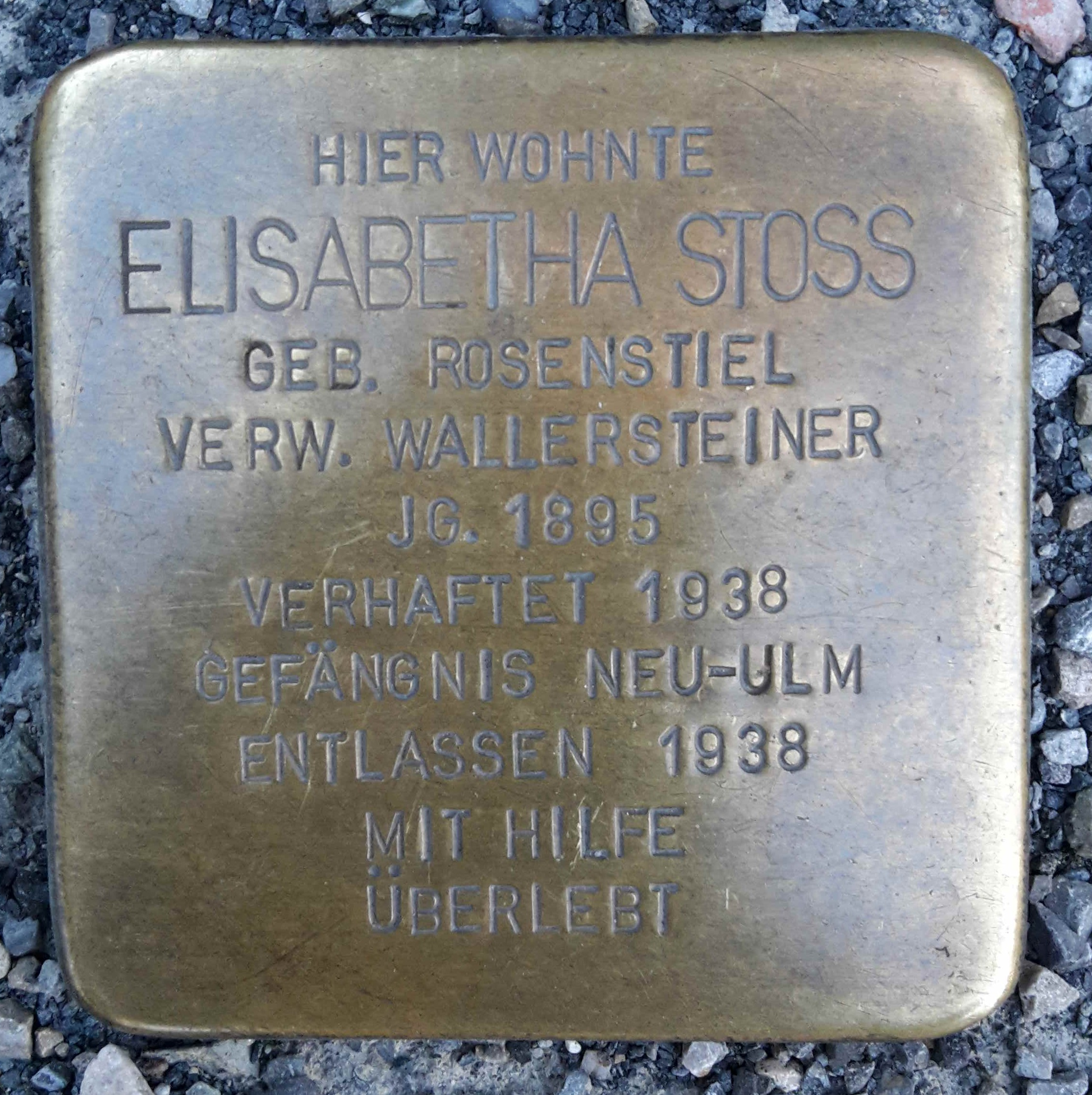 Stolperstein für Elisabetha Stoss